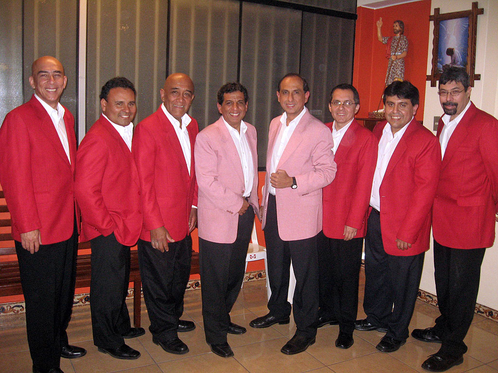 Los Pakines, en un local de Los Olivos (Lima-Perú)